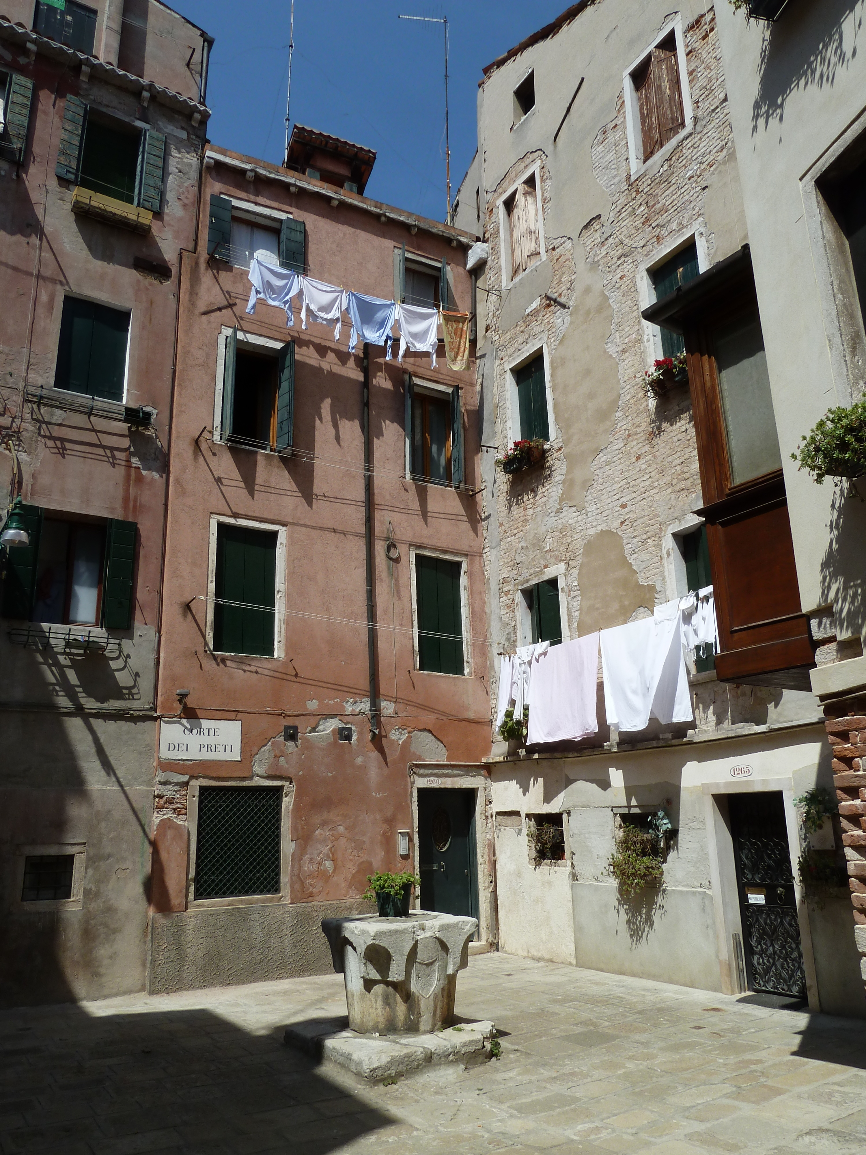 Corte dei preti san polo next to Campo S Aponal (San Polo)